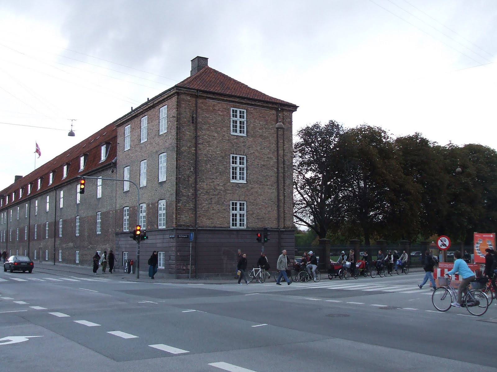 Rosenborg Barracks on Øster Voldgade in Copenhagen, Denmark